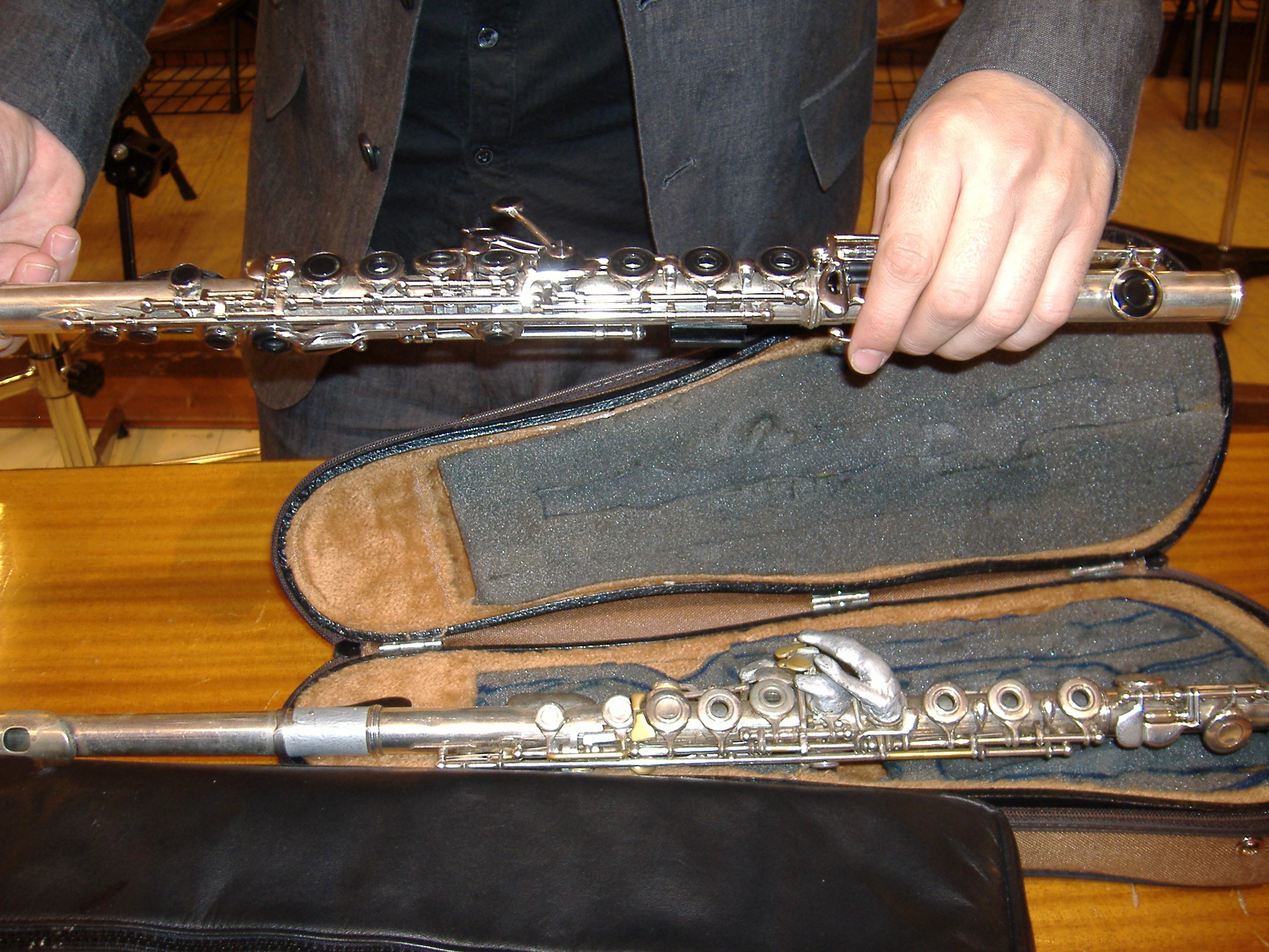 Frauta prónomo e prototipo durante a I Convención de Frautistas da Asociación Española de Frautistas (AFE) celebrada en Madrid en 2010.